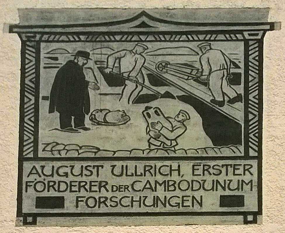 Fresko zu Ehren August Ullrichs an einem Haus in gleichnamiger Straße in Kempten, Bayern